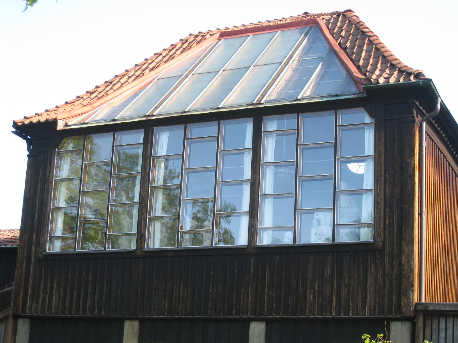 Carl Eldhs ateljémuseum, Bellevueparken, Stockholm, exteriör från norr, studioateljén. Arkitekt Ragnar Östberg. Ateljébyggnaden var klar 1919.